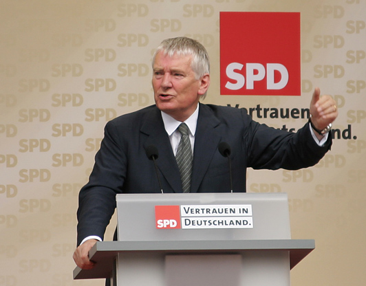 Innenminister Otto Schily bei einer Wahlkampfkundgebung der SPD in München rund eine Woche vor der Bundestagswahl